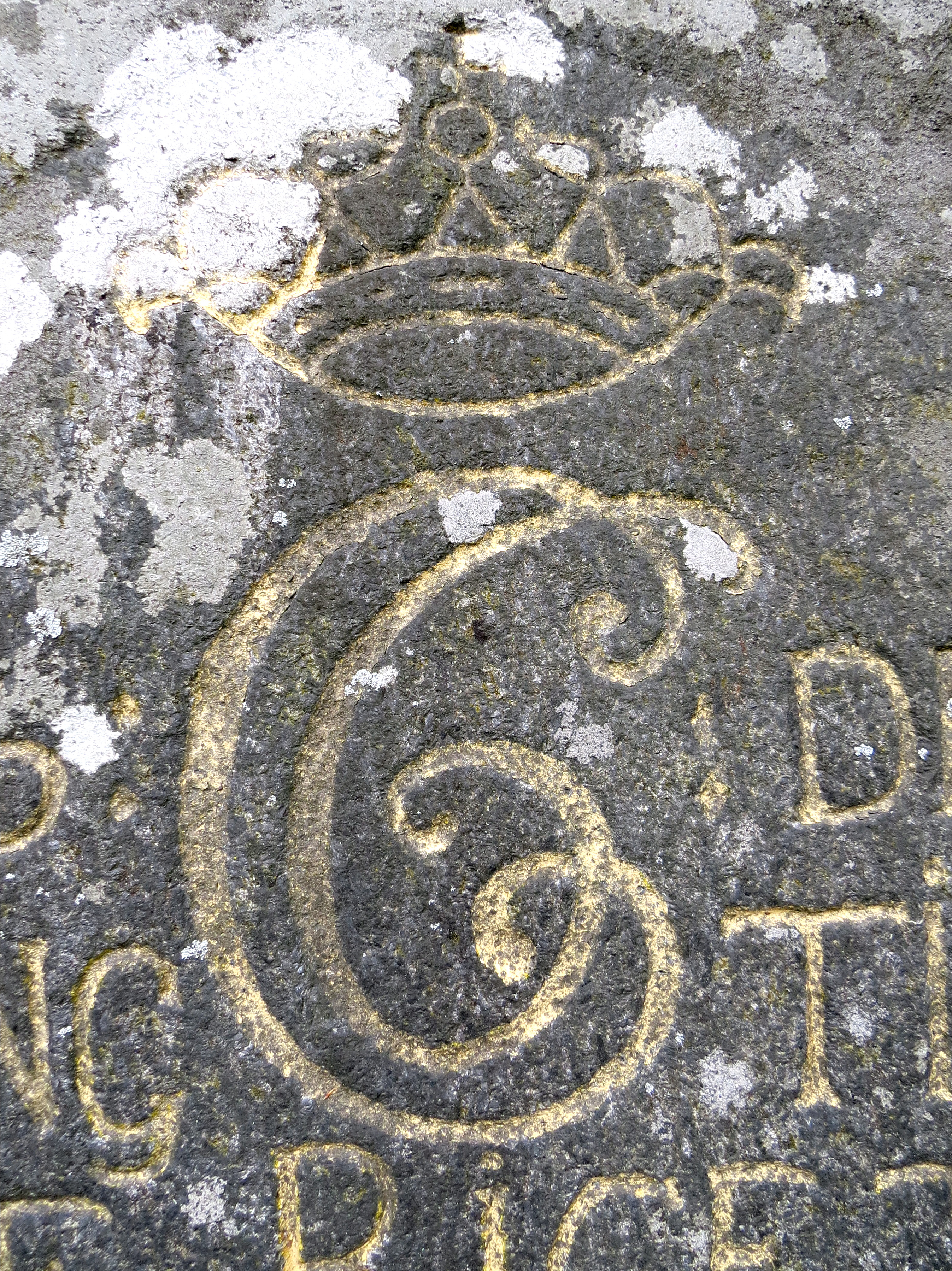 Christian VI af Danmark og Norges monogram, hugget ind i bjerget til minde om Kongen-, Dronningen- og Markgrevindens ankomst og afsked i Laurvigen i 1733, Herregårdsbakken, Larvik